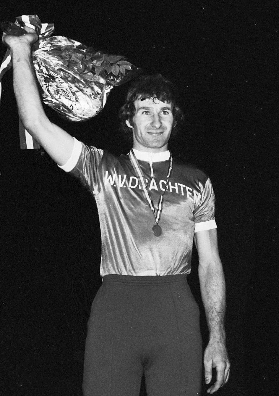 Nederlandse kampioenschappen Stayeren beroeps 1974; huldiging 50 km amateurs